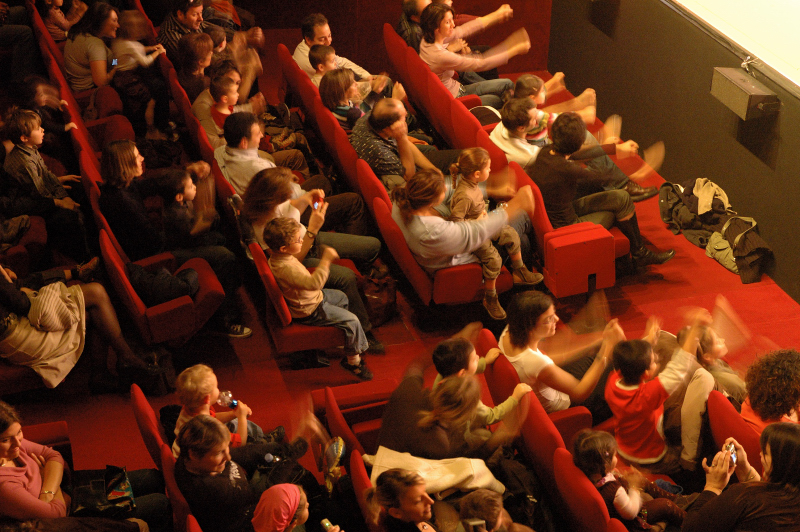 festival marionnettissimo